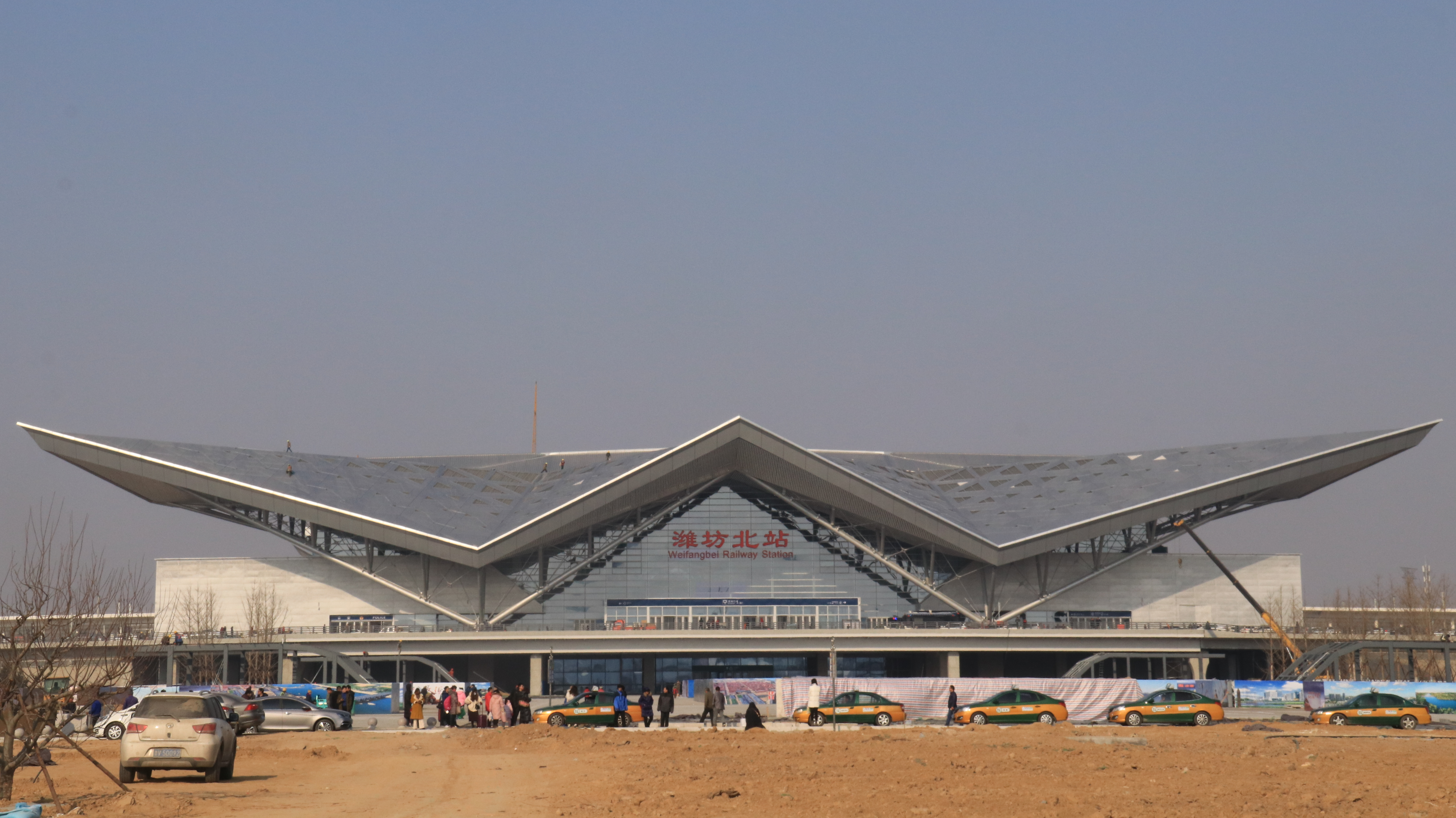 中文（中国大陆）: 济青高铁潍坊北站站房远望